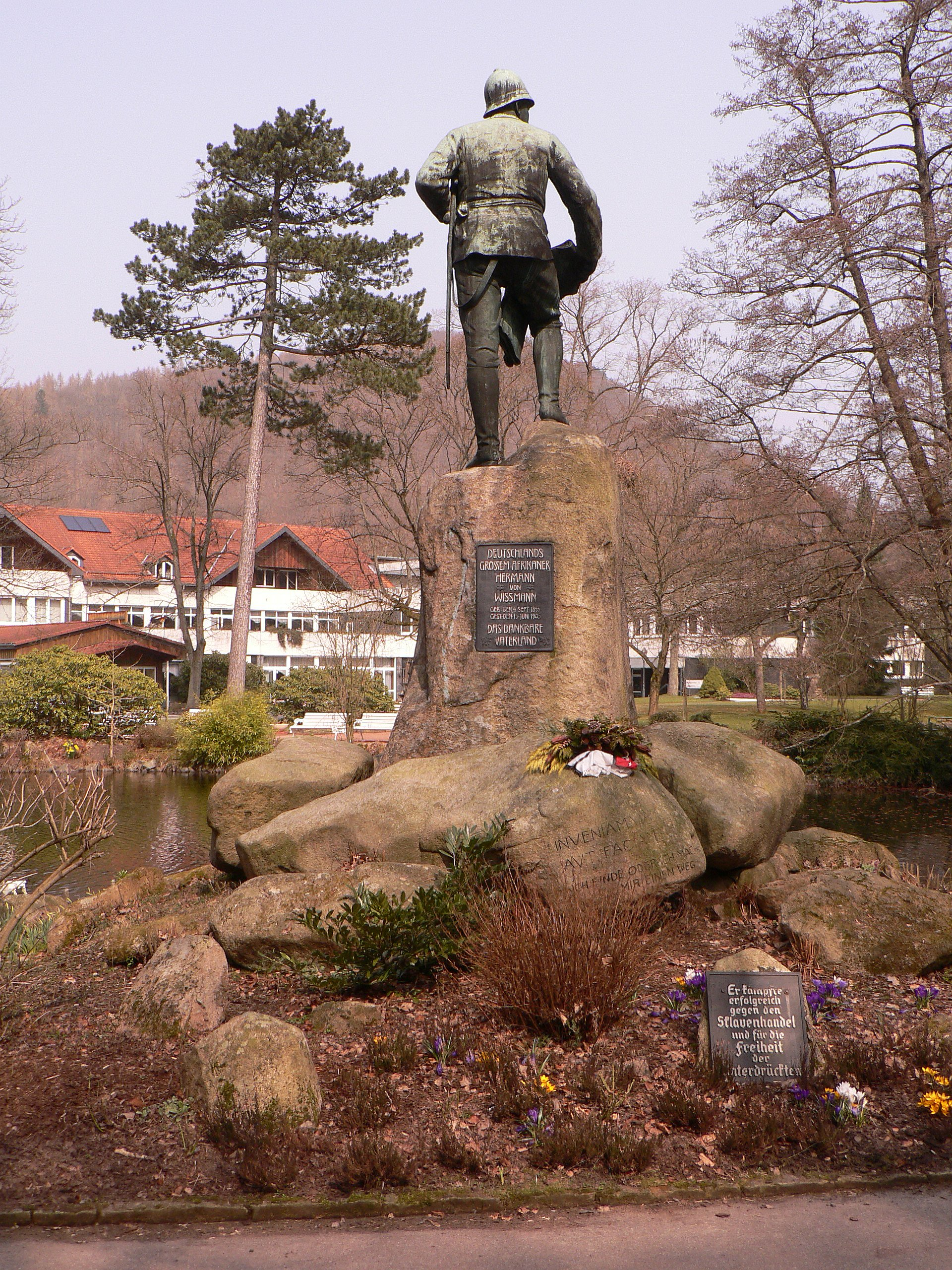 Rückseite des Wissmann-Denkmals in Bad Lauterberg